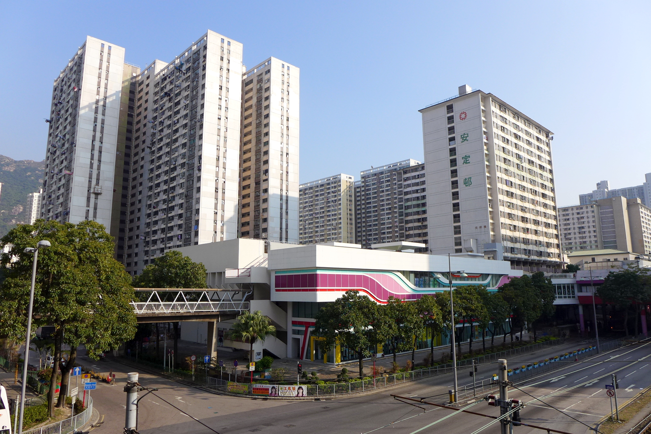 On Ting Estate